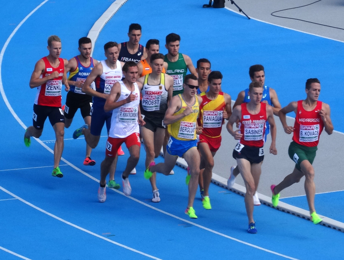 Młodzieżowe Mistrzostwa Europy w Lekkoatletyce U23 w Bydgoszczy 13-16 lipca 2017, kwalifikacje biegu na 1500 m mężczyzn